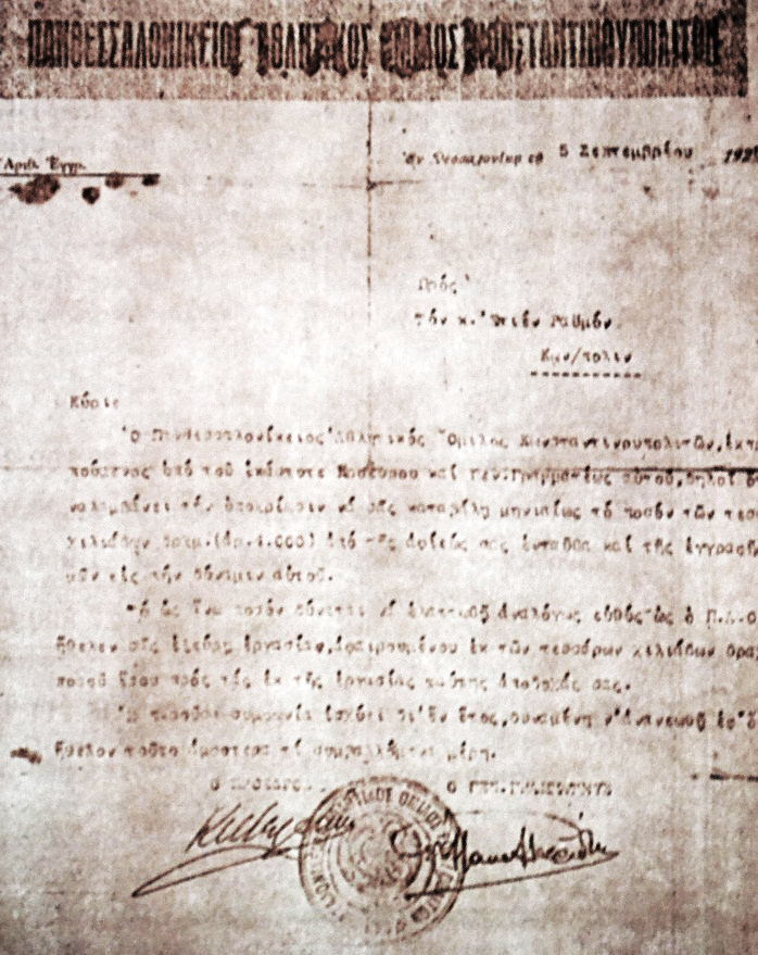 Το πρώτο επαγγελματικό συμβόλαιο ποδοσφαιριστή στην Ελλάδα, του Ραϊμόν Ετιέν